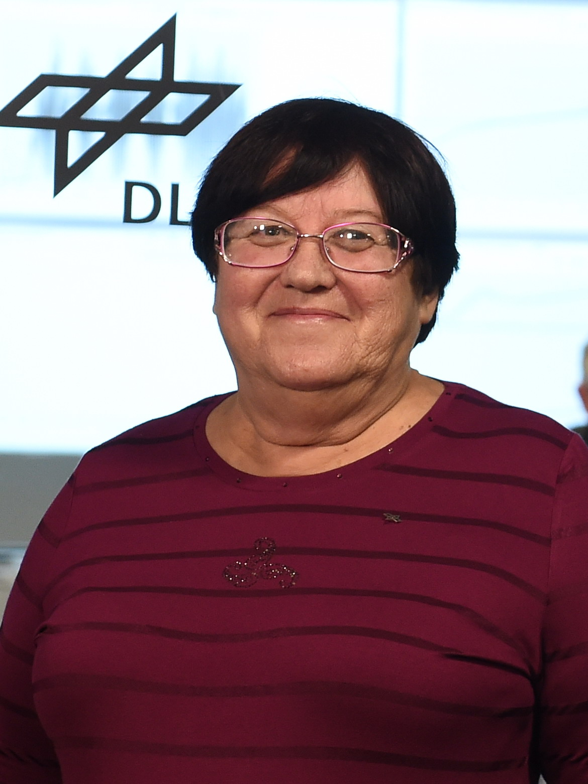 Светлана Герасименко